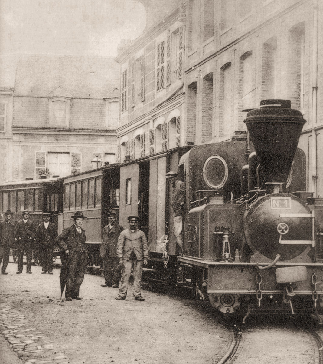 Le tramway de Saint-Romain-de-Colbosc au centre de la ville de Saint-Romain. Locomotive n°1 (Corpet Louvet n°680 de 1897)